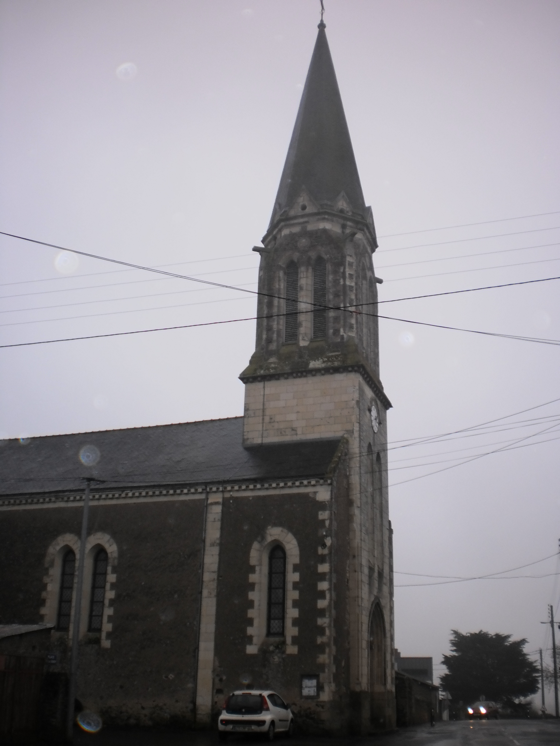 Pouillé-les-Côteaux (Loire-Atlantique, France) - église